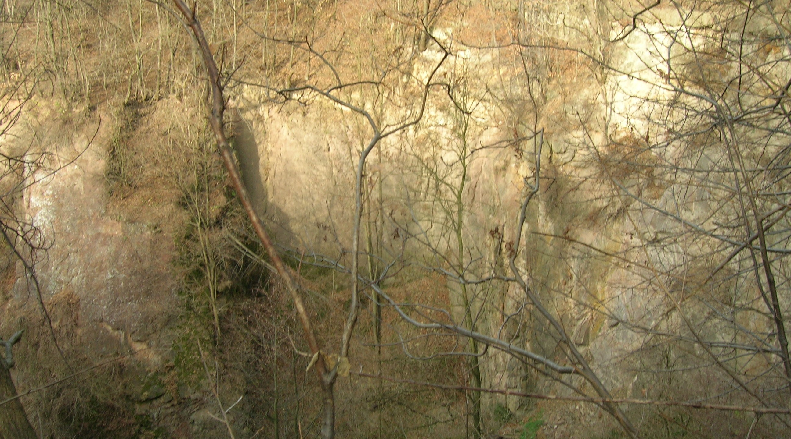 Stary Łom.Zalas